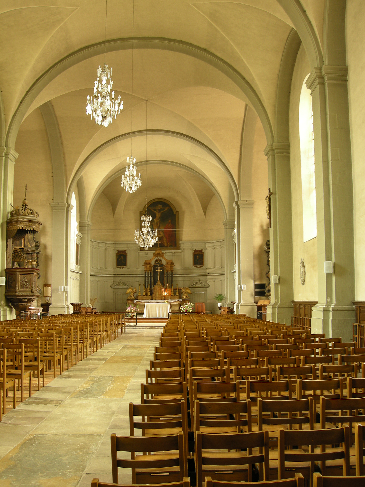 Intérieur de l'église de Lure